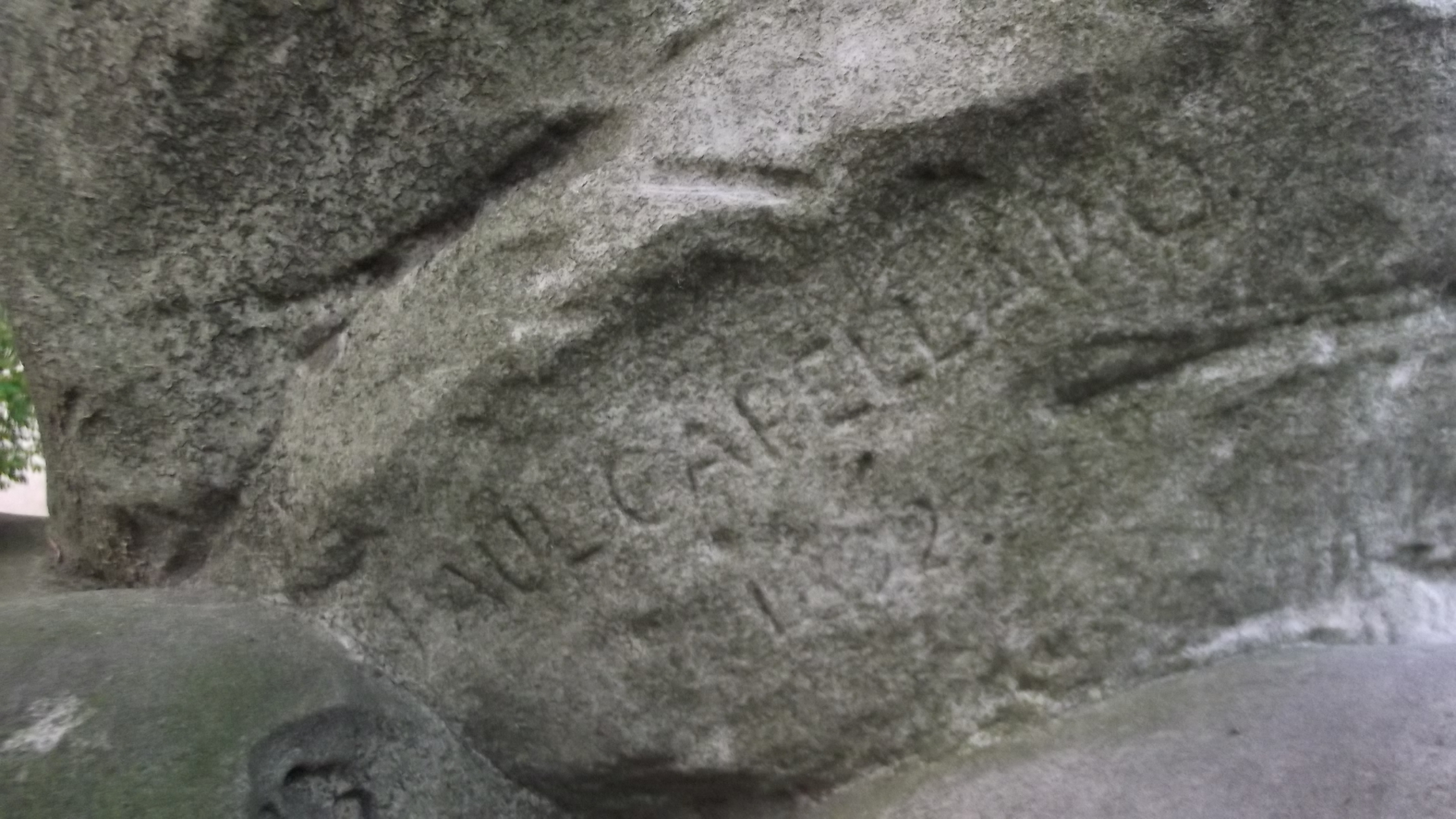 Signature du "Le Déluge" par Paul (Gabriel) Capellaro, 1892